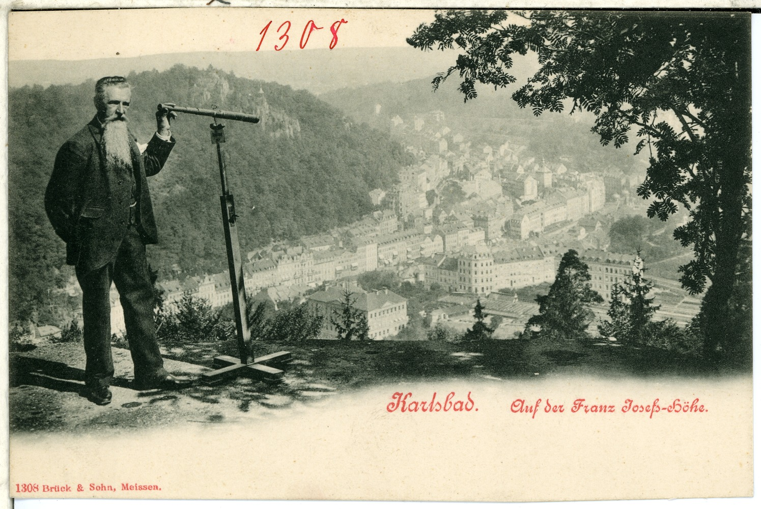 Karlsbad; Blick von der Franz-Joseph-Höhe This postcard is from publisher Brück & Sohn in Meißen ( This postcard has a unique number 01308 and is available in a higher resolution at the publisher. This images was uploaded in a cooperation project between Wikipedians and the publisher.